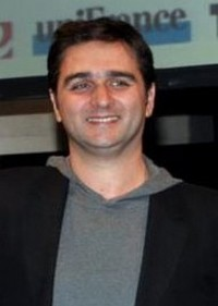 Olivier Nakache, à la cérémonie des Prix Lumières 2012